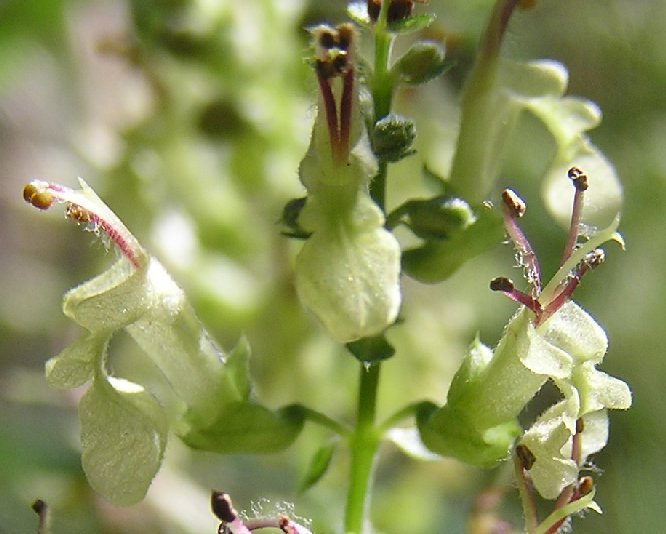 Teucrium scorodonia an einer sonnigen Waldstelle im Ahrtal